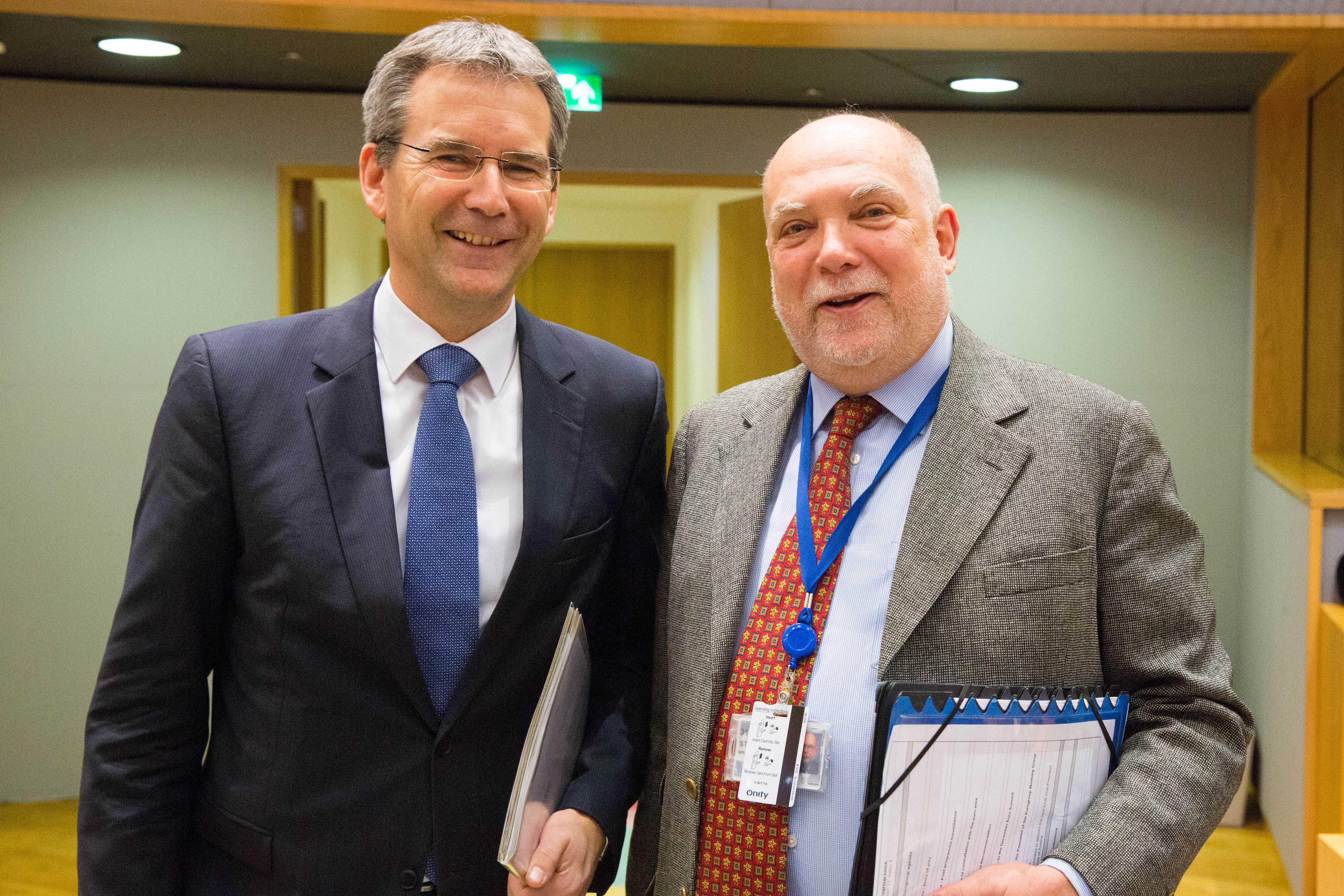 (C) Schneider - Brüssel (Belgien) - 22.01.2018 - Heute reiste Finanzminister Hartwig Löger (ÖVP) zu seinem Antrittsbesuch bei der EU nach Brüssel. PHOTO: Finanzminister Hartwig Löger im Gespräch mit dem Vorsitzenden des Wirtschafts und Finanzausschusses Thomas Wieser (R)